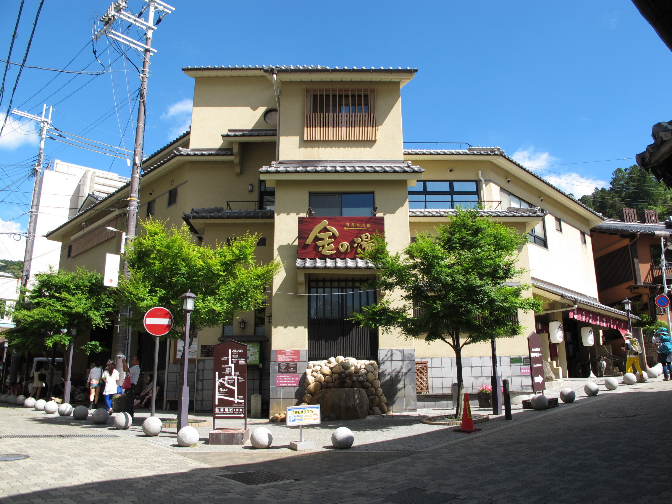 Kin-no-yu Arima Onsen